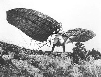 Otto Lilienthal repüléshez készül